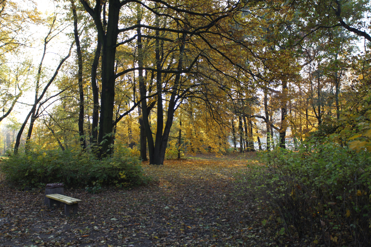 Park Chrobrego